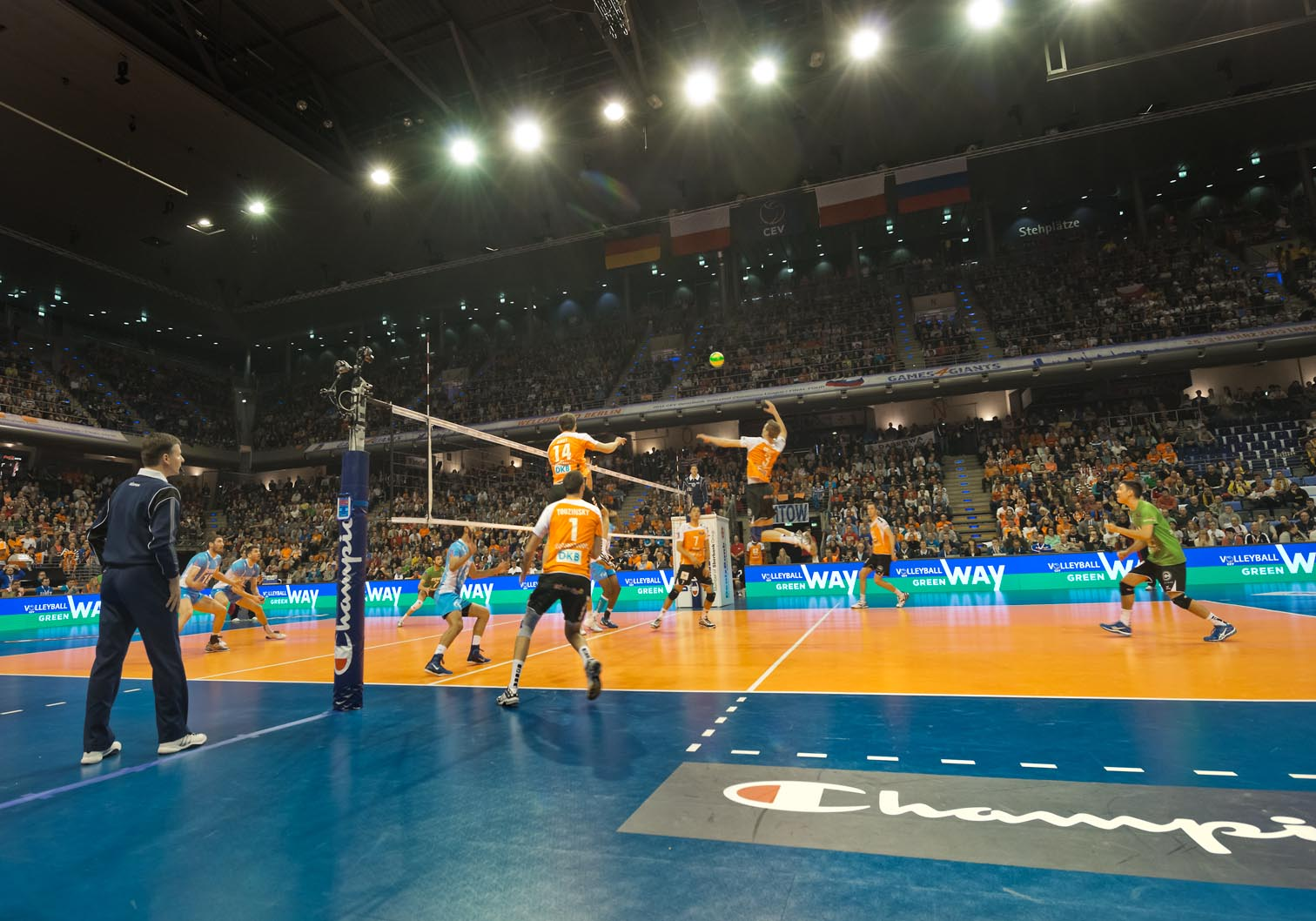 Cev Final 2015 - Berlin Recycling Volleys Spiel in der Max-Schmeling-Halle.